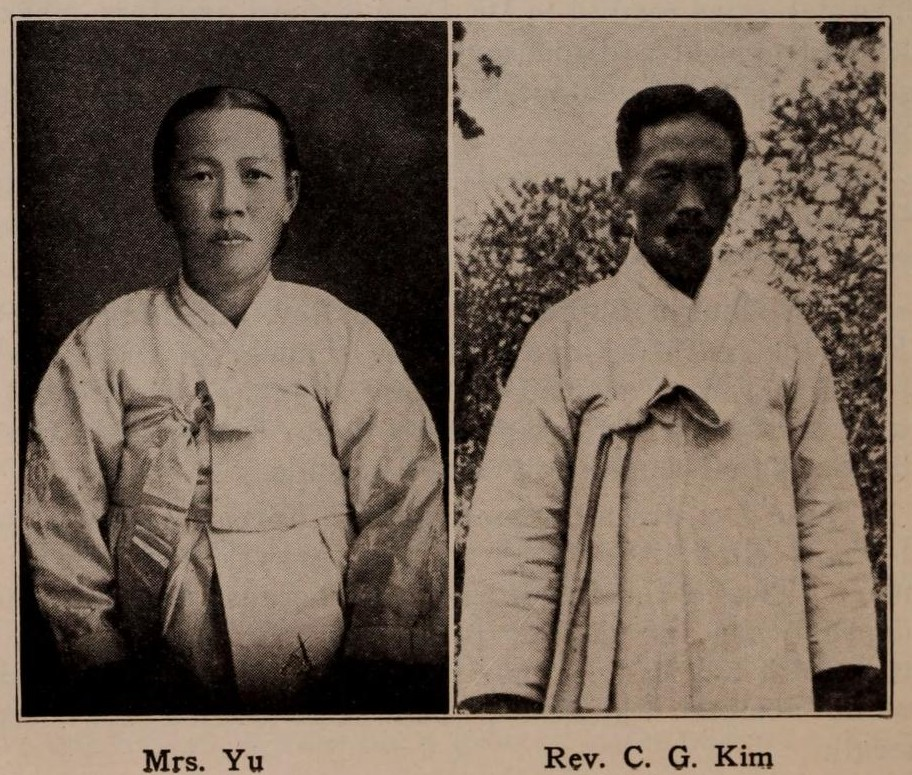 1893년 Rev. Reynolds에게 개신교 세례를 받은 5인 중 유씨부인과 김창국. 기록에는 Mrs. Yu라고 되어 있으나 실제로는 유성안의 부인 김씨이다.